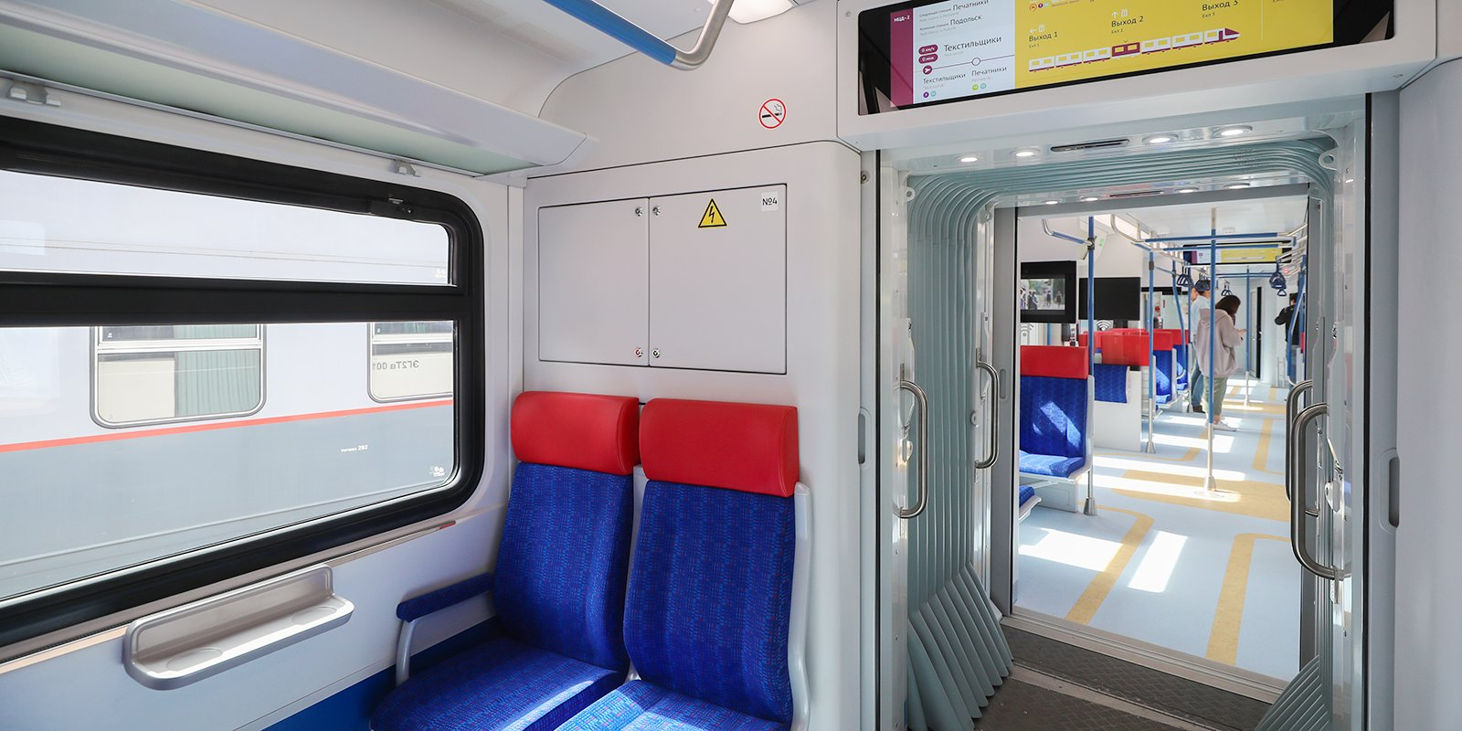 Салон моторного вагона электропоезда ЭГ2Тв-027 «Иволга». Крайние сиденья и межвагонный переход